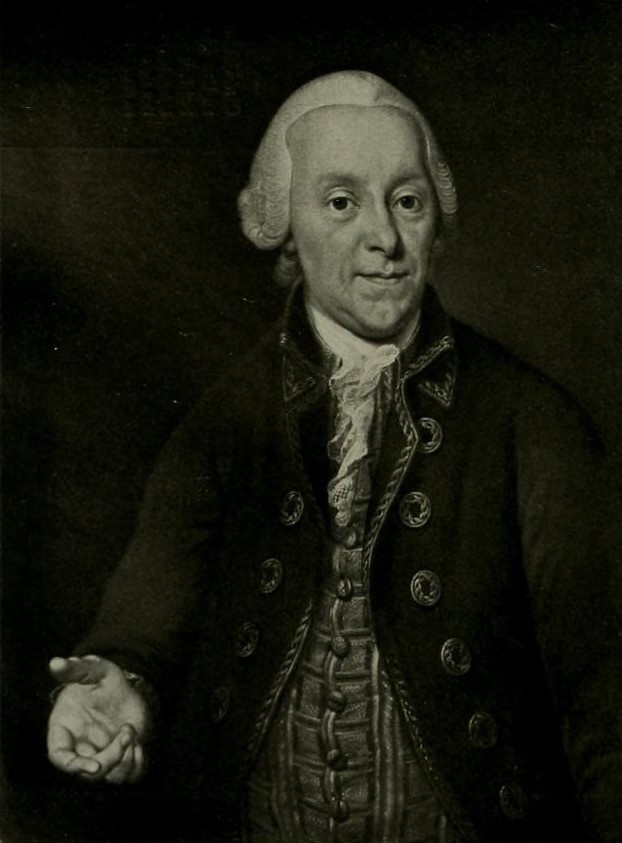 Johann Eberhard Ihle - Portrait Christoph Karl Kress von Kressenstein